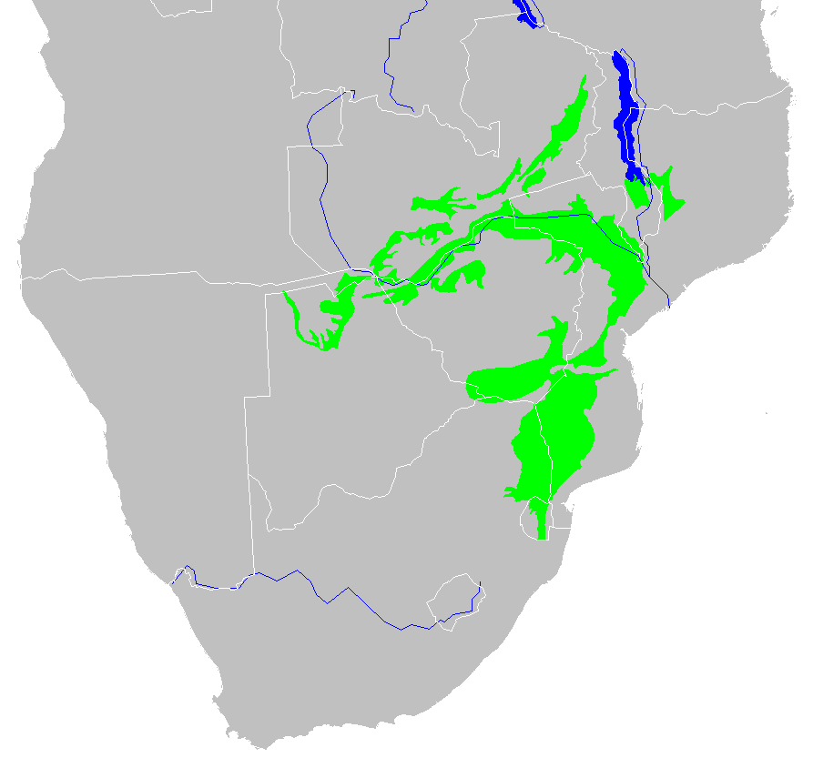 Zambezian and Mopane woodlands ecoregion map